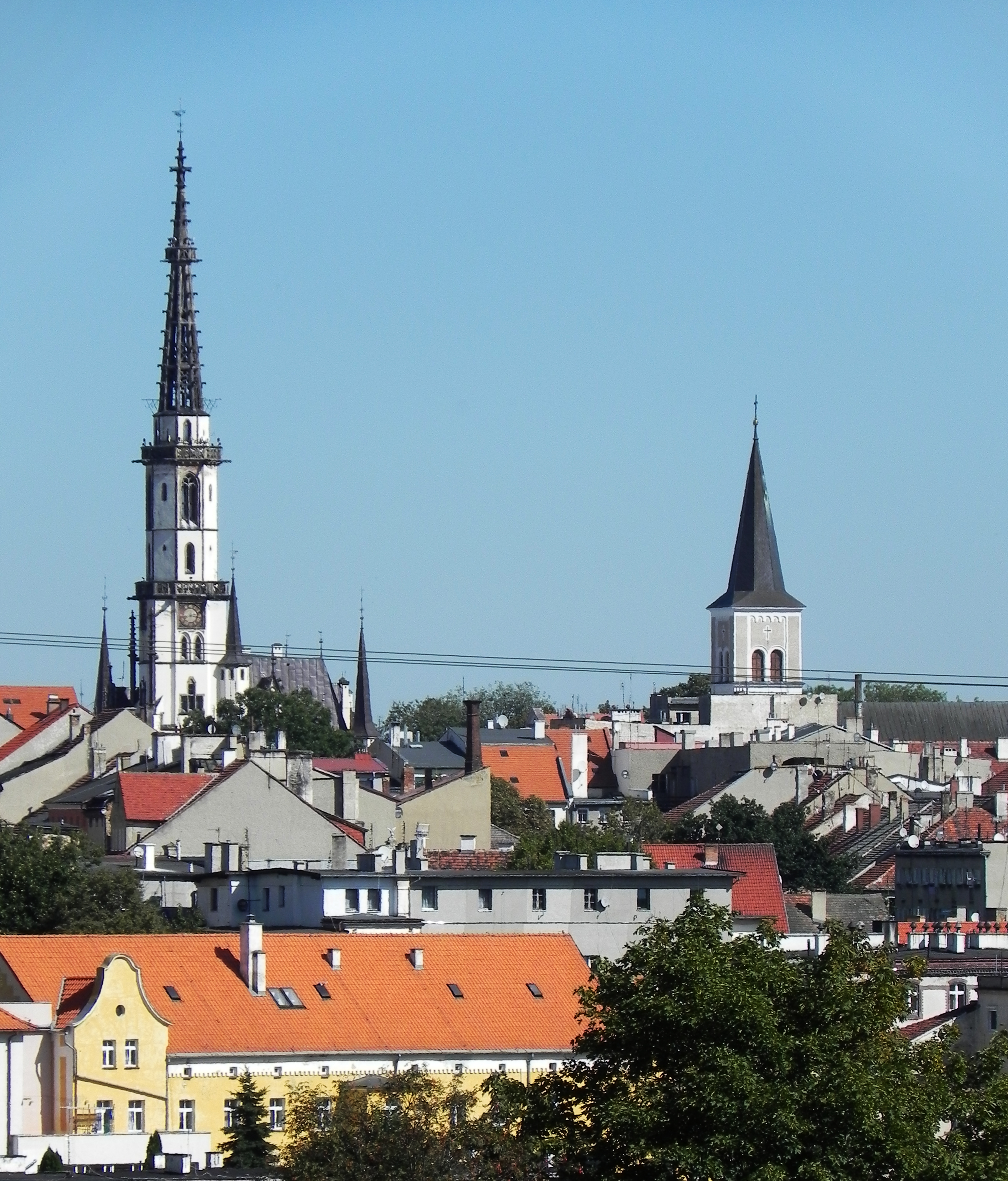 Ząbkowice Śląskie, ośrodek historyczny miasta